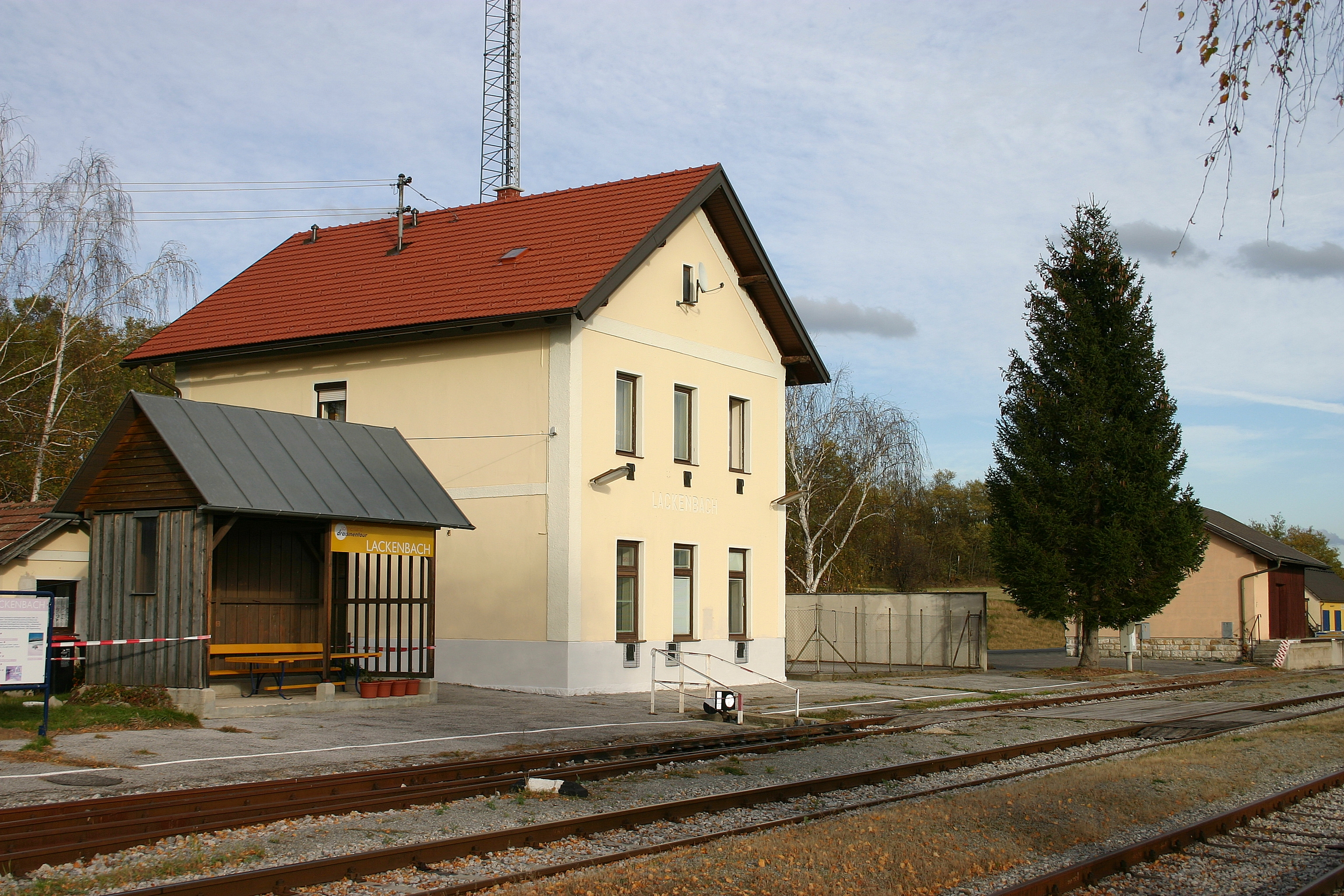 Lackenbach, Bahnhofgebäude der Burgenlandbahn – der Personenverkehr wurde im Mai 2001 aufgelassen